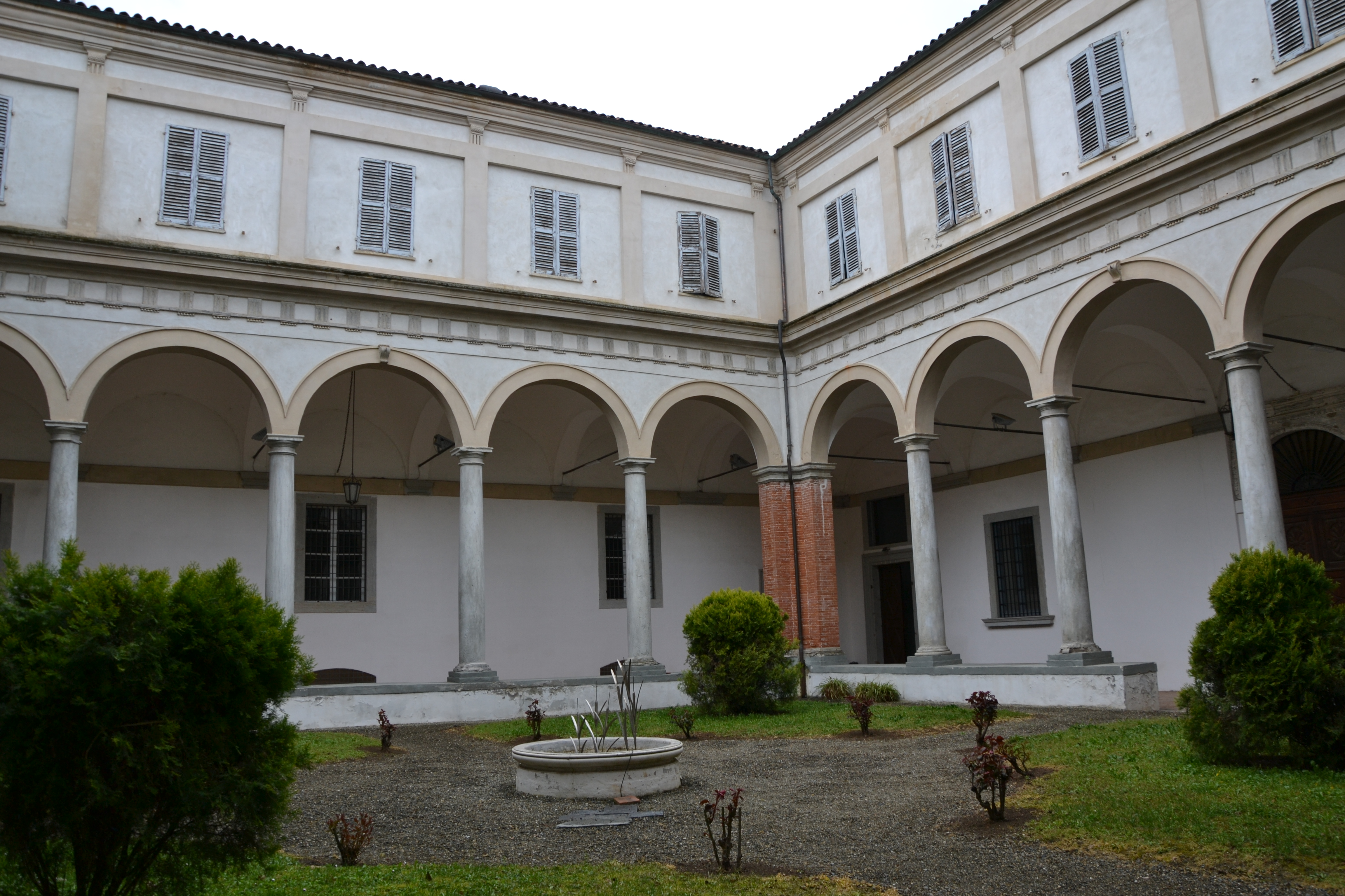 convento domenicano di Santa Croce a Bosco Marengo (AL) realizzato per volontà di papa Pio V nella seconda metà del sec. XVI, nel 1862 divenne riformatorio giovanile fino al 1989.